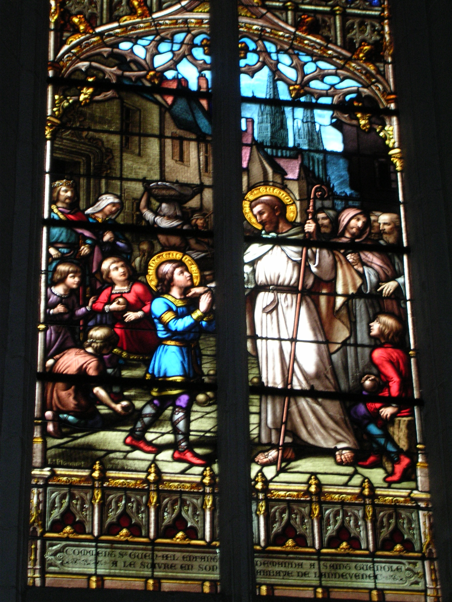 Cathédrale Saint-Corentin de Quimper .